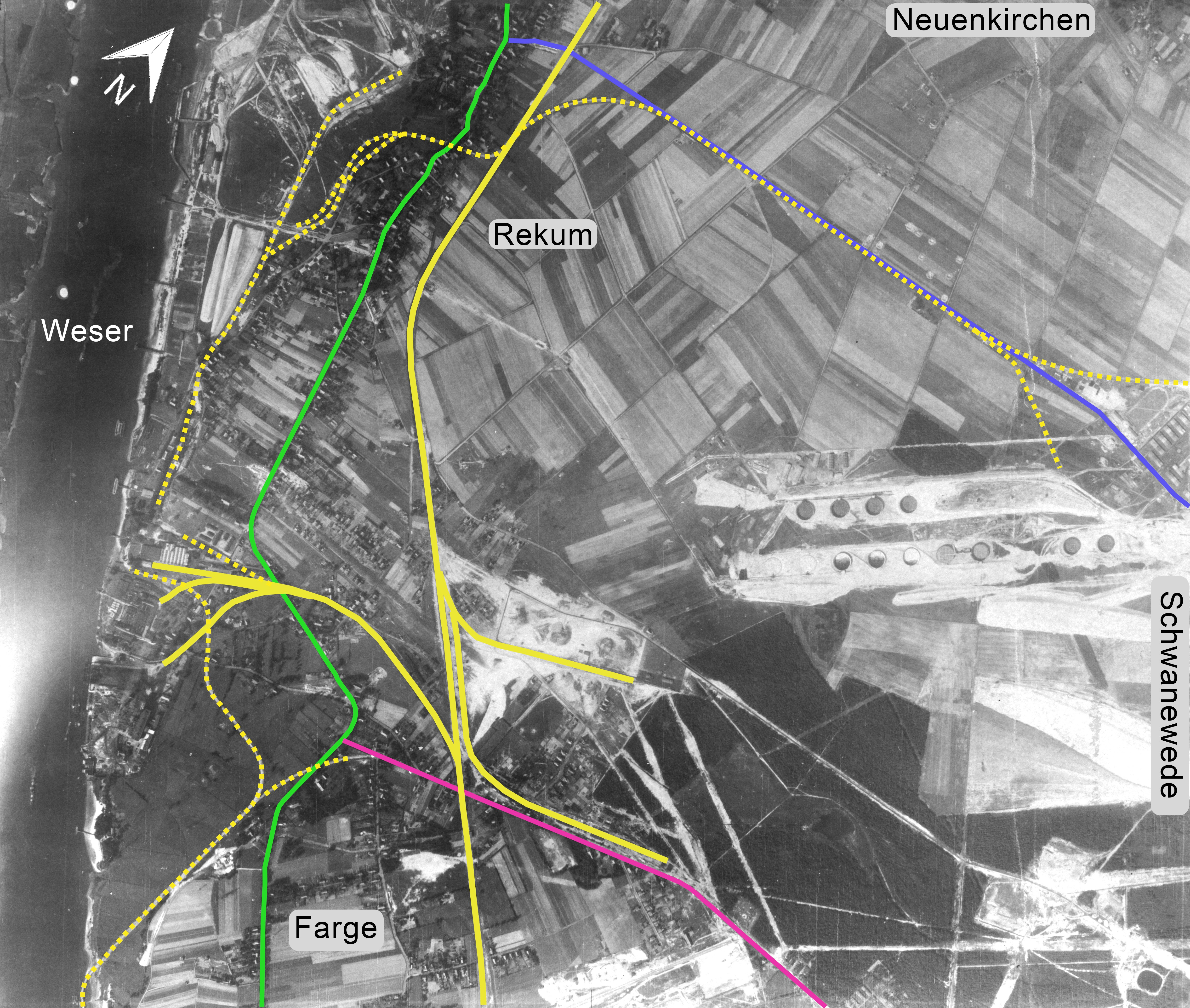 Bremen-Farge, alliierte Luftaufklärung September 1943; erkennbare Verkehrsinfrastruktur nachgezeichnet (unvollständig): Farger/Rekumer Straße (grün), Hospitalstraße (blau), Betonstraße (pink) Eisenbahn (gelb), Feldbahn (gelb gepunktet); plus Ortsbezeichnungen und Nordpfeil.